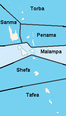 Province of Malampa (Vanuatu)